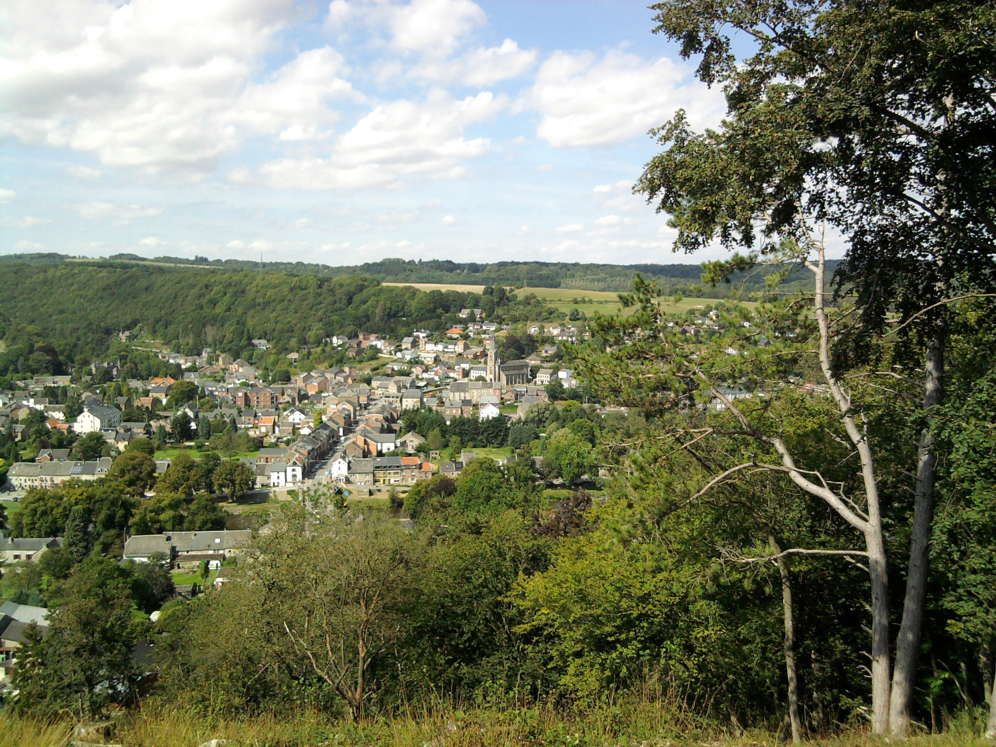 Panorama du village de Hamoir depuis le rocher de Coisse